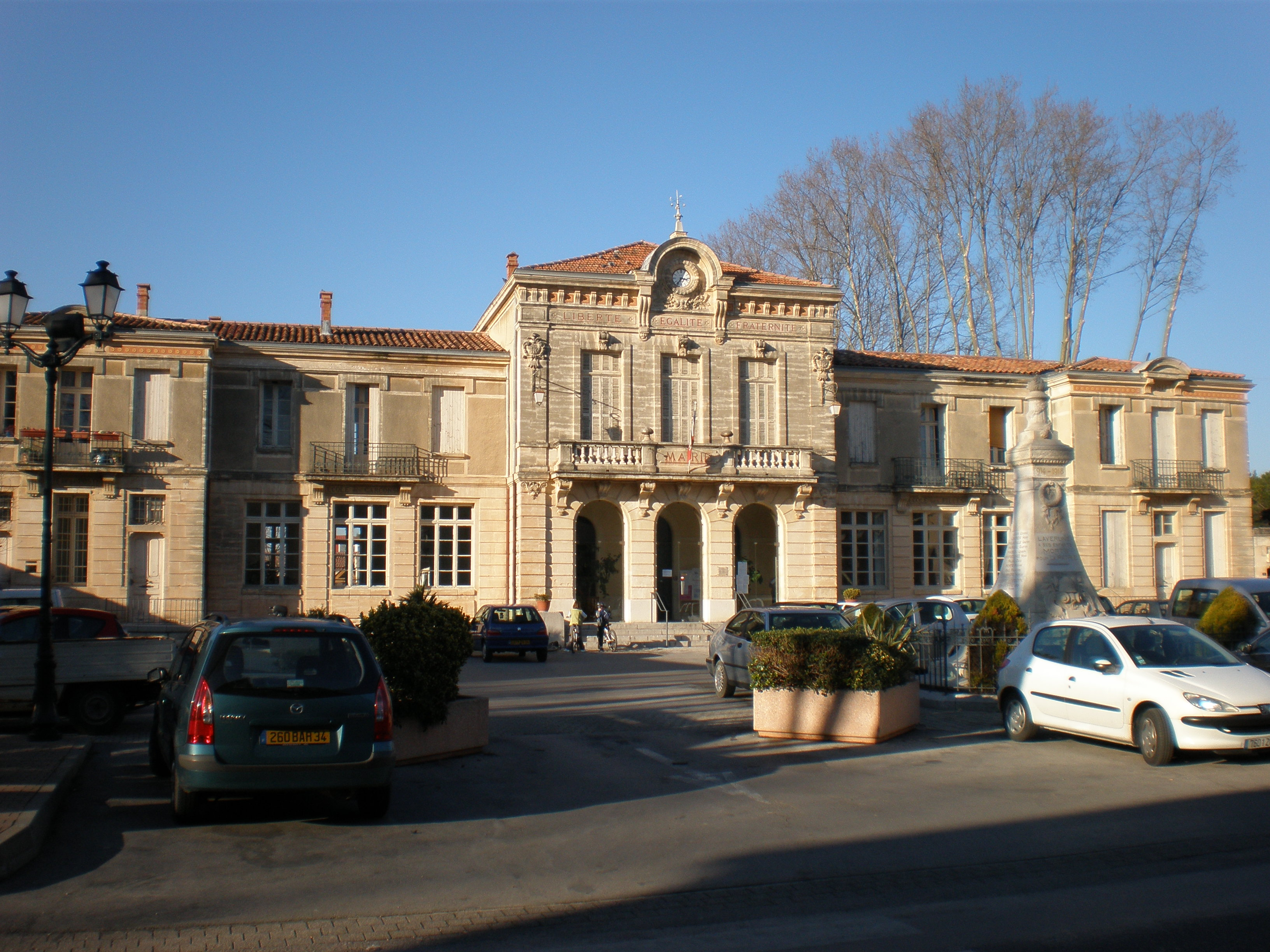 Mairie de Lavérune (Hérault)